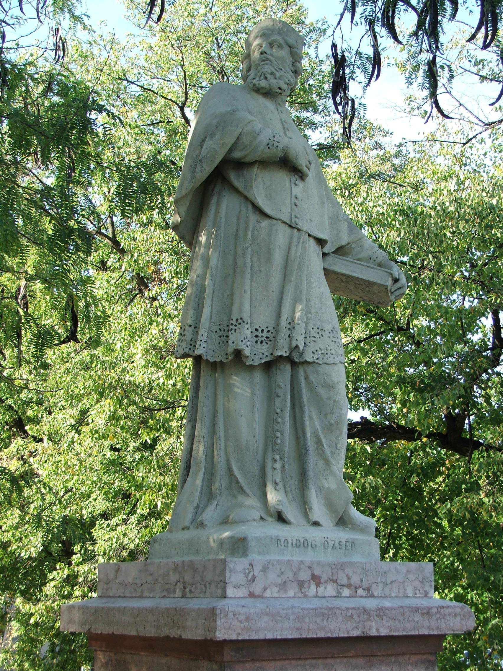 Boldog Özséb szobra a Szent István téren, Esztergomban. A tér ÉK-i végén, hasáb alakú, újabb talapzaton áll a szent alakja papi öltözékben, bal kezében könyvvel. Eredetileg a Fürdő Szálló melletti Nepomuki Szent János-szobor két oldalára állíttatta a Szent Kőrösi Márk szoborral (trsz.: 2308) 1780-ban Görgey Márk kanonok. 6235 This is a photo of a monument in Hungary, Identifier: 6235